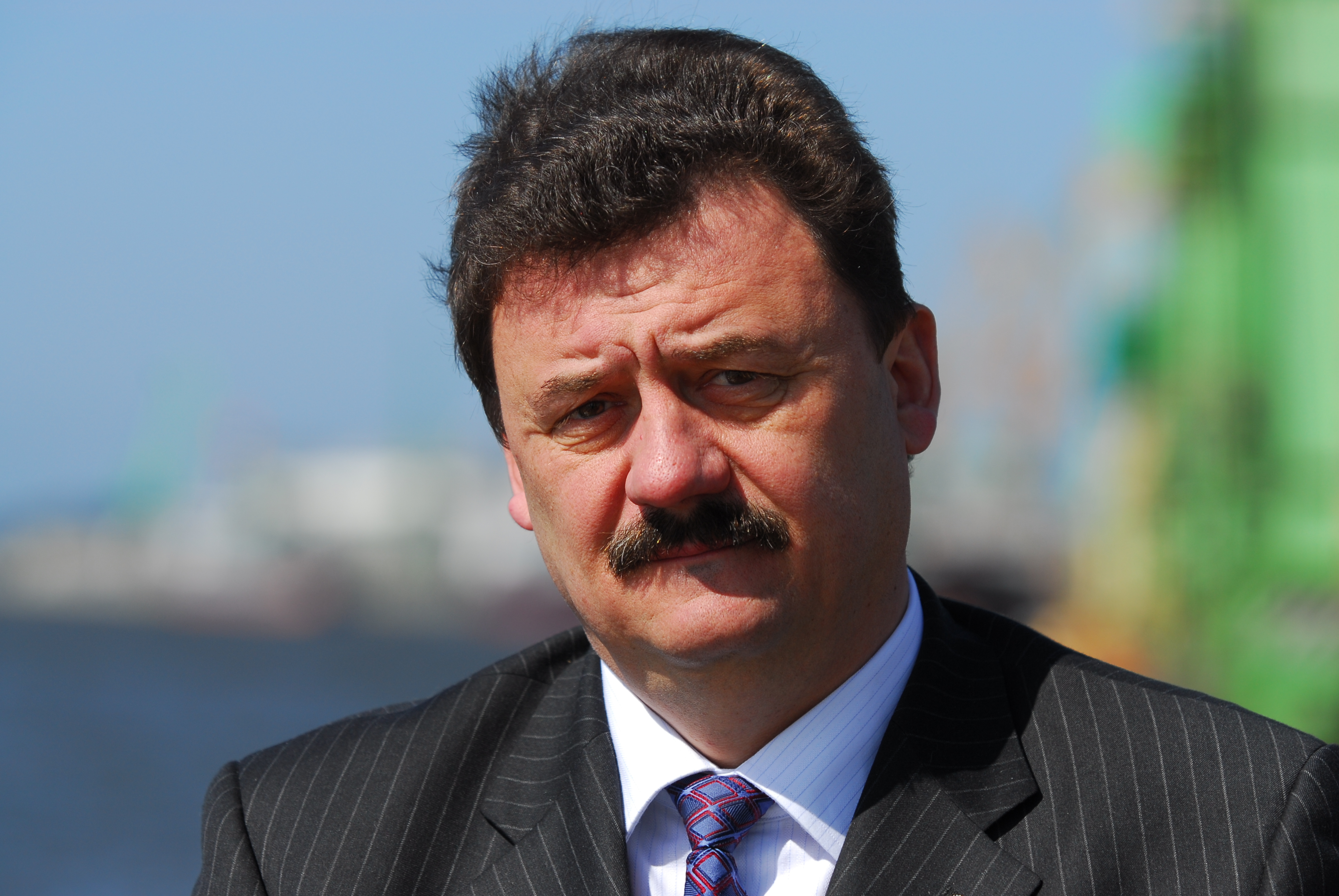 Audrius Pauža byl v letech 1996–2009 generálním ředitelem UAB „Krovinių terminalas“ (Nákladový terminál Klaipėdského přístavu, od 9. 4. 2009 pod novým názvem KLASCO - pokračoval v téže funkci), který spadal/spadá pod koncern Achemos grupė.